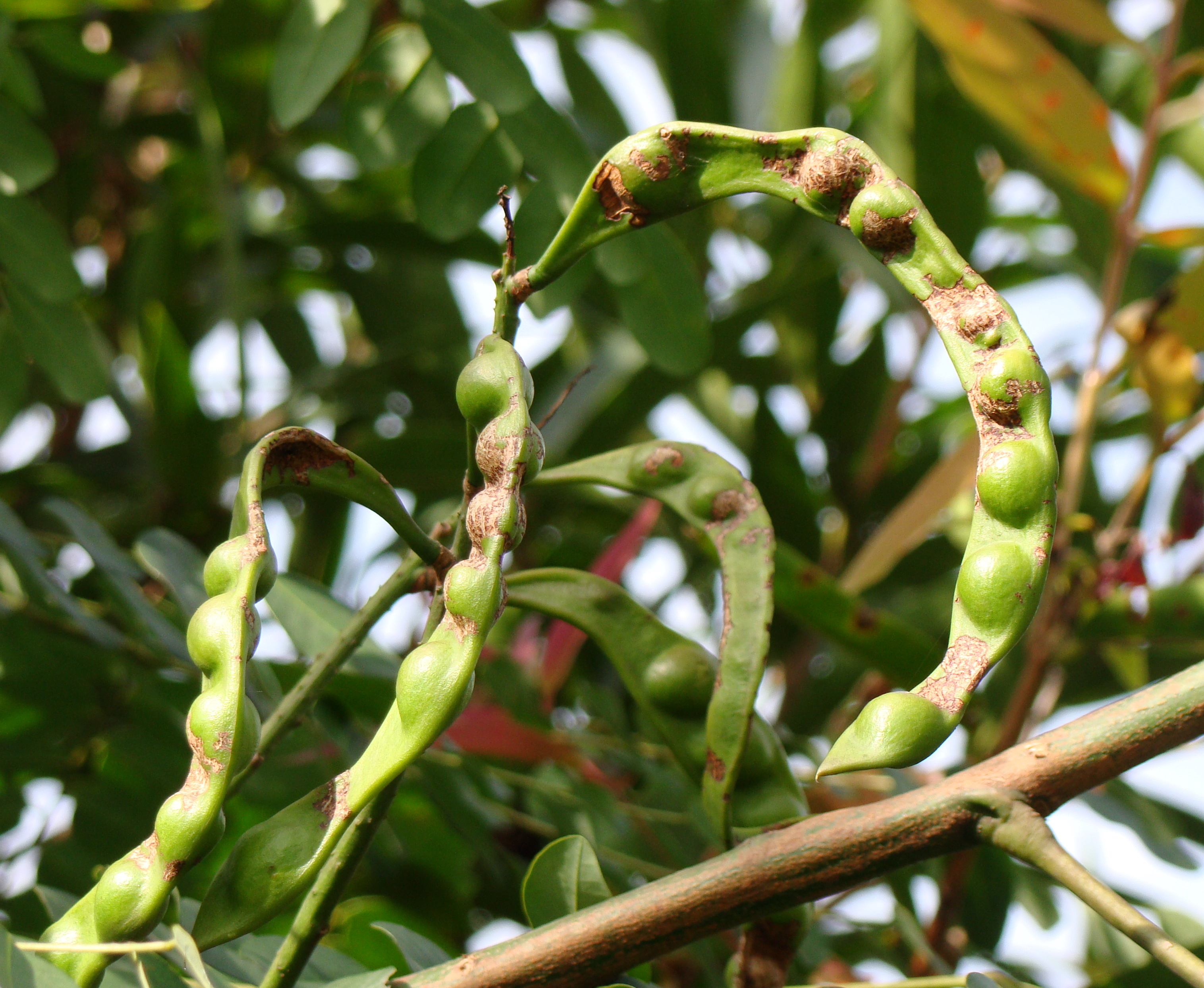 Ceret S�o Paulo